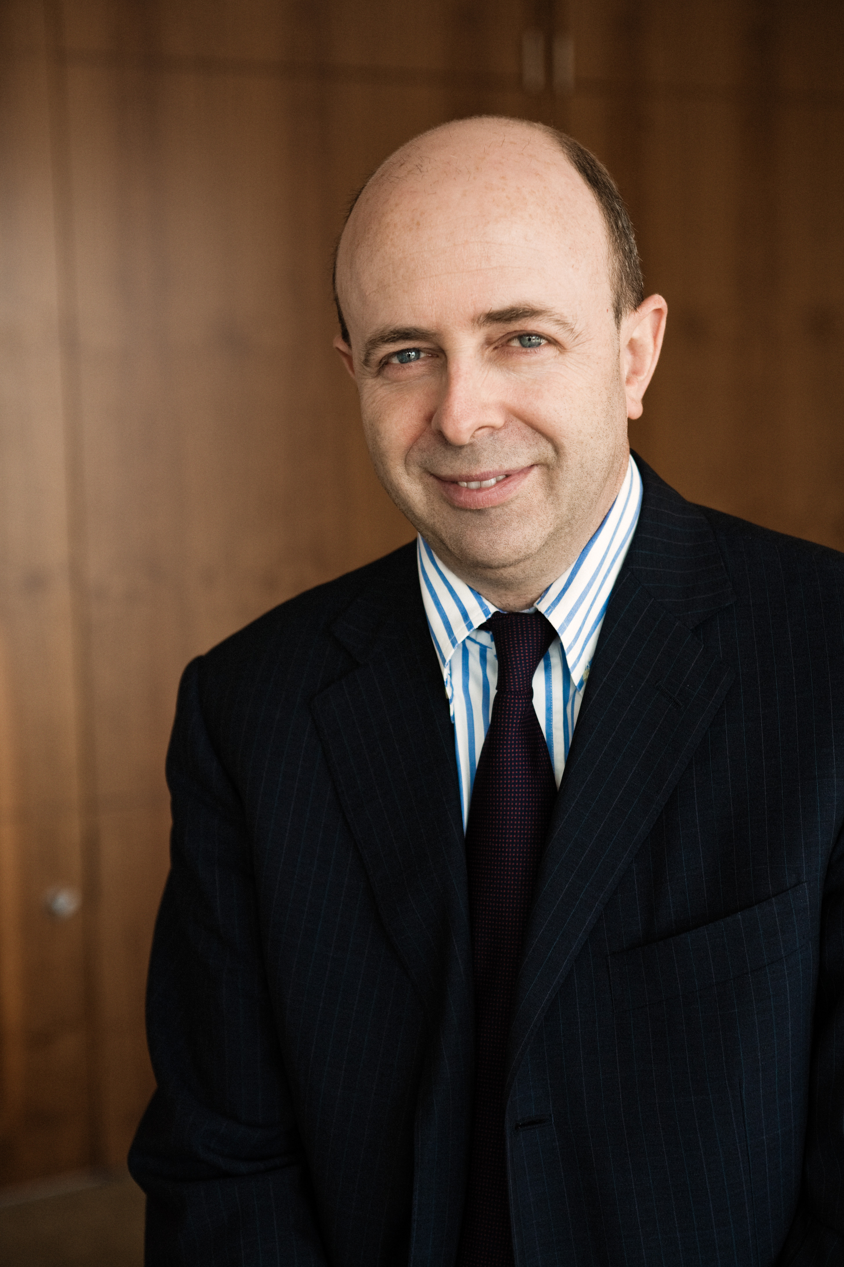 Amministratore Delegato Borsa Italiana